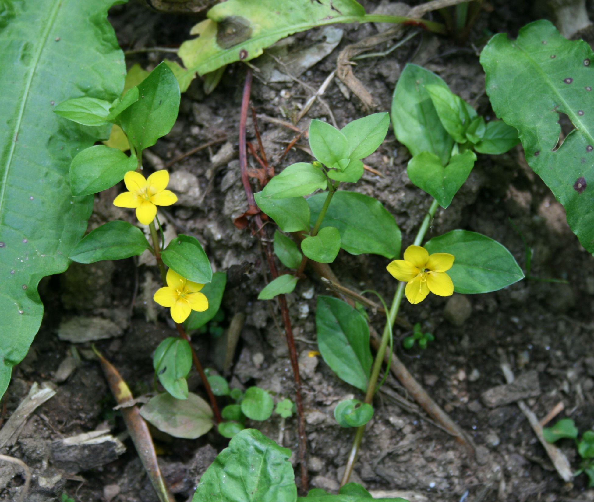 Lysimachia nemorum, Myrsinengewächse (Myrsinaceae) - Italien/Italia/Italy: Kalabrien/Calabria, Prov. Reggio Calabria, Aspromonte, SE Melia, ESE Scilla